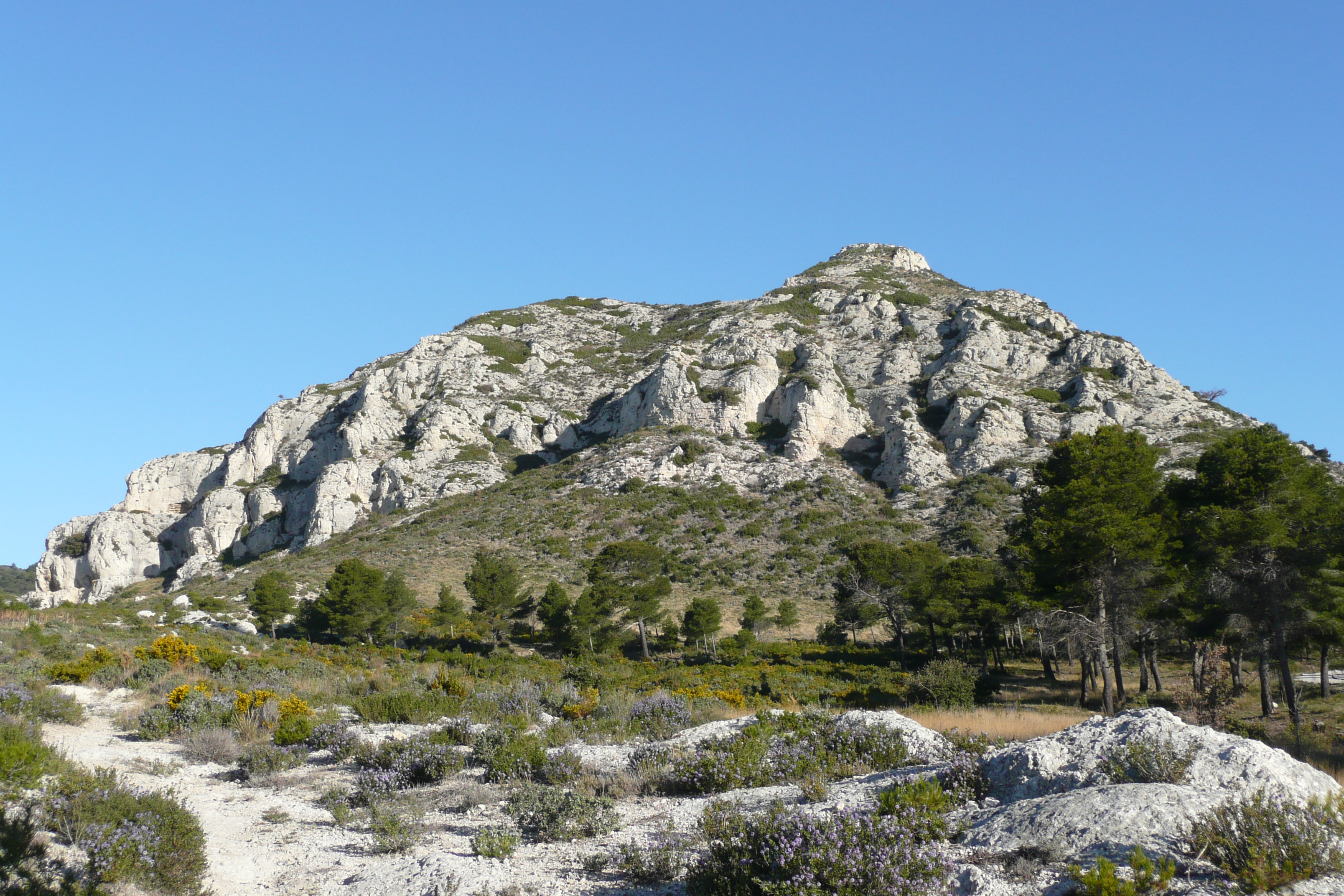 Les Alpilles près de Maussance les Alpilles.